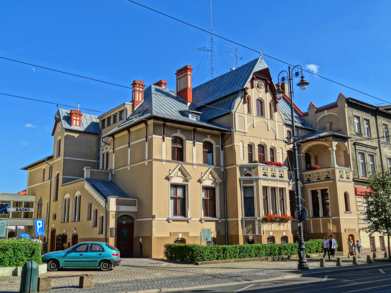 Willa przy ul. Gdańskiej 48 w Bydgoszczy (radio PiK)